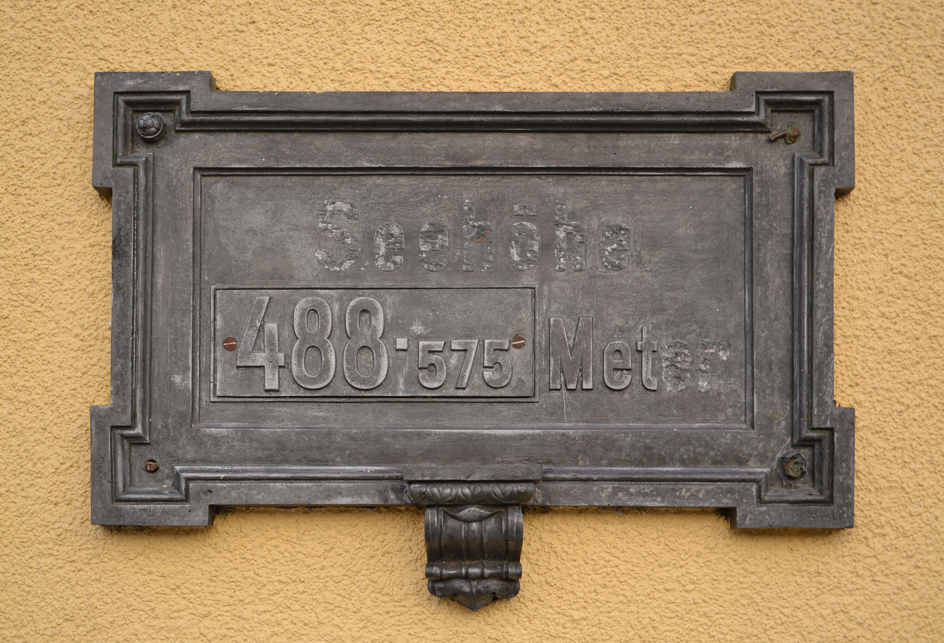 Old Sign about Sea-Level (old german script "Seehöhe" and "Meter") at Railway Station Rajcza, Poland